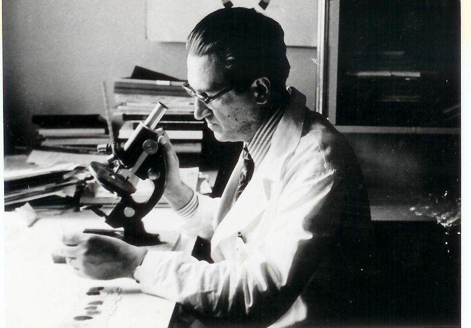 Arcadiu Petrescu. Fotografie oferită de Dr. Arcadiu Petrescu şi cedată în domeniu public